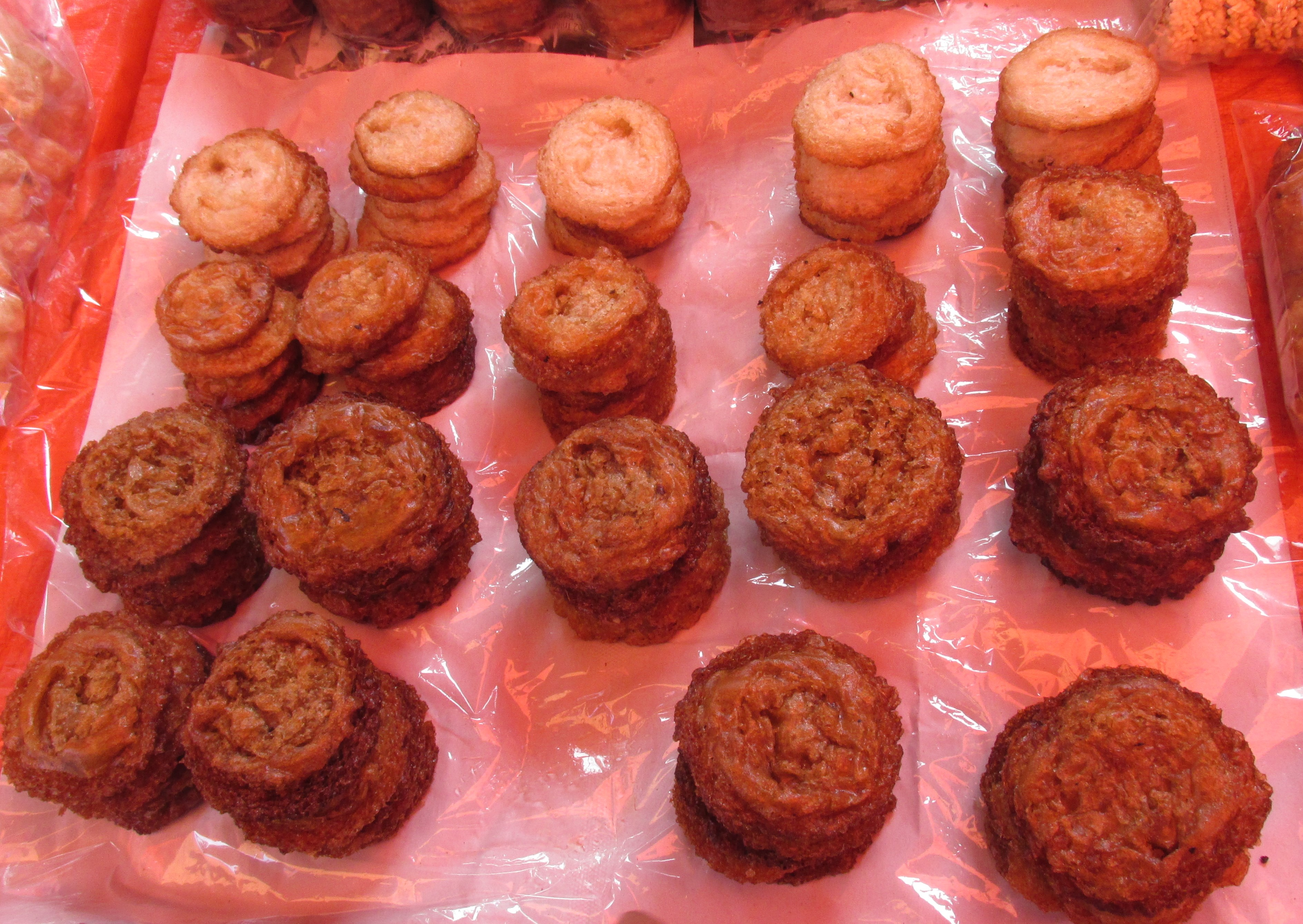 Pinyaram salah satu makanan ringan berbahan dasar beras.